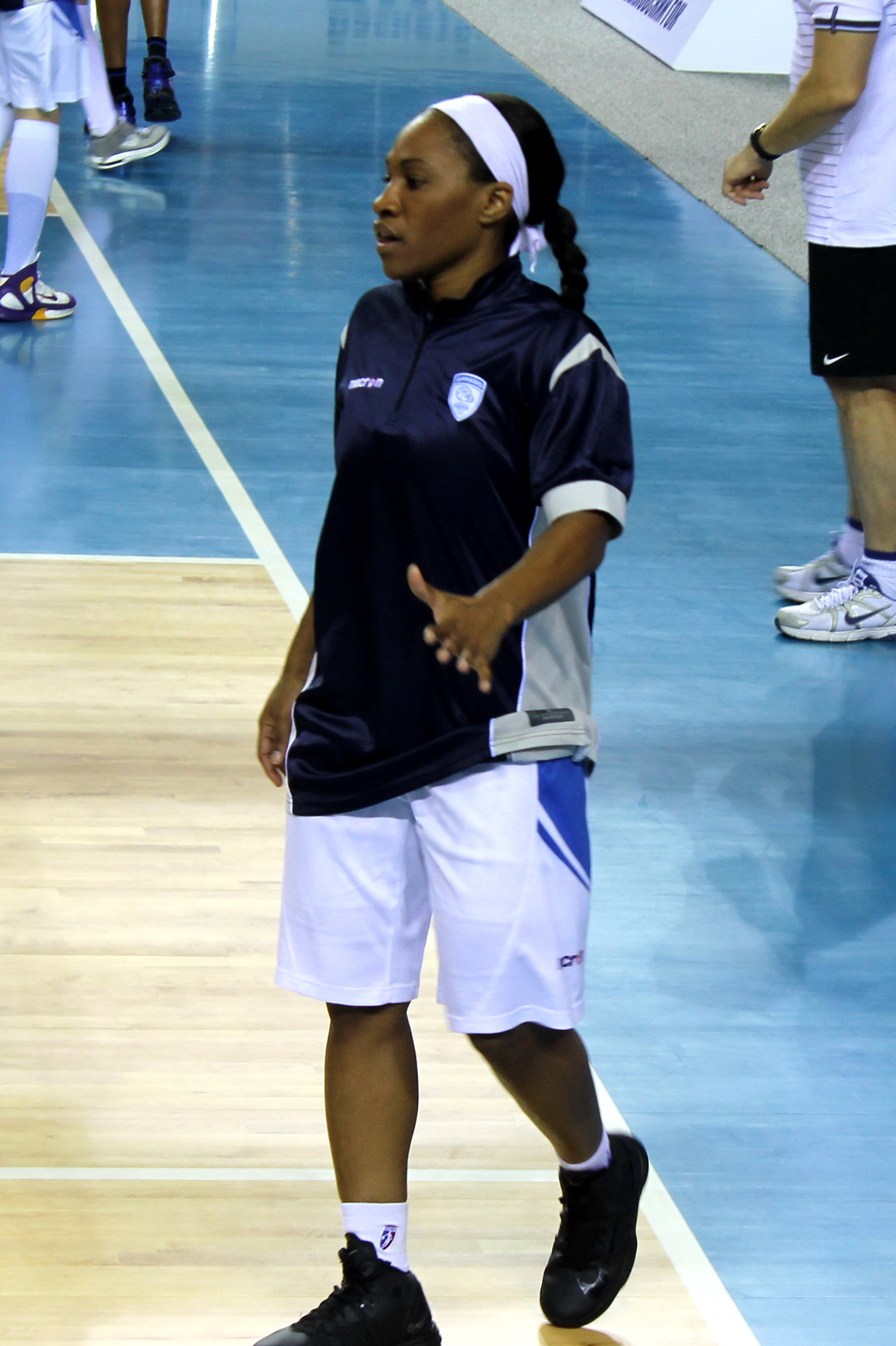 Темика Джонсон, игрок женского баскетбольного клуба "Динамо" (Курск) (сезон 2012/2013)